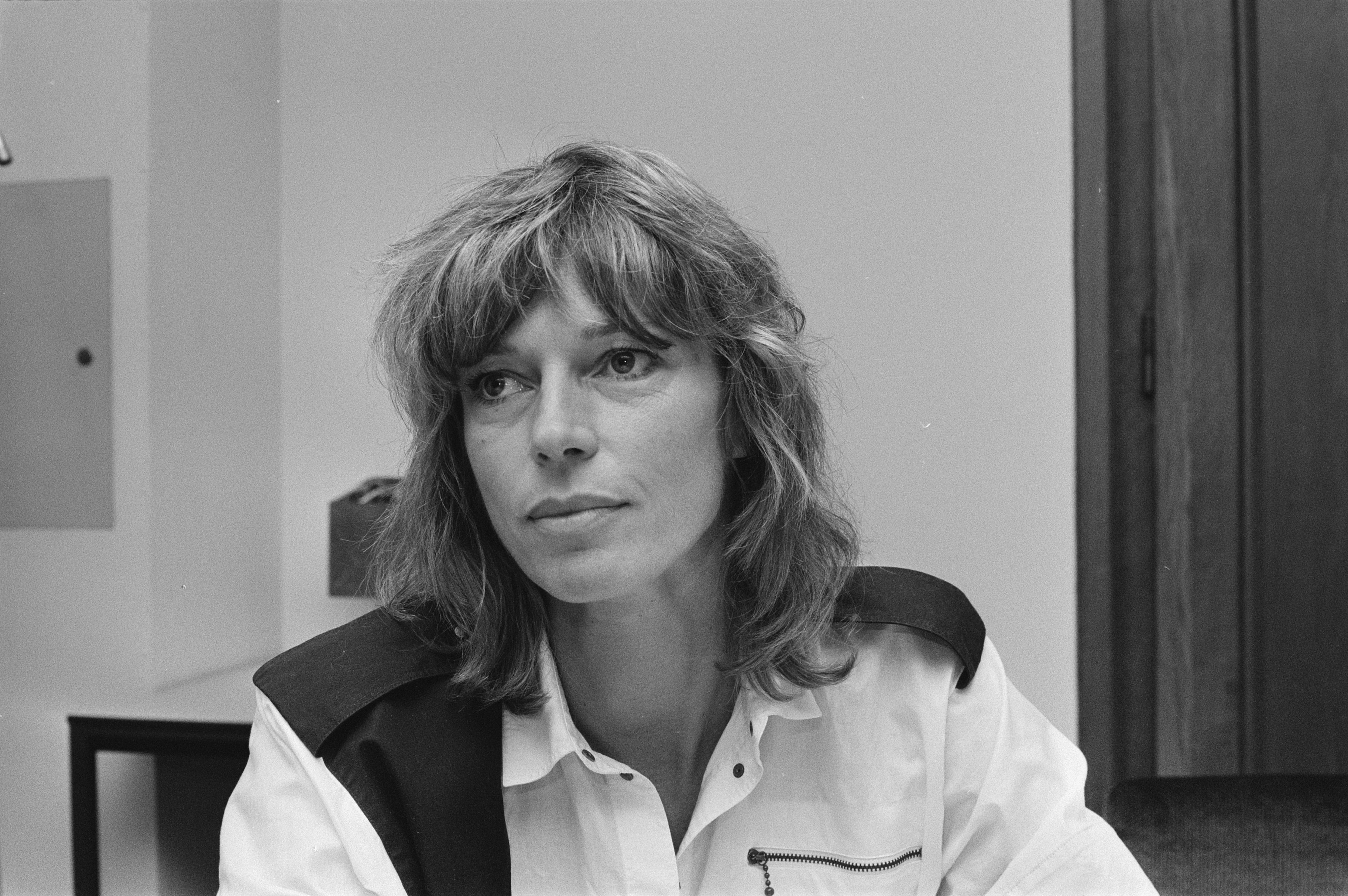 Persconferentie Cox Habbema naar aanleiding van benoeming tot directeur Stadsschouwburg